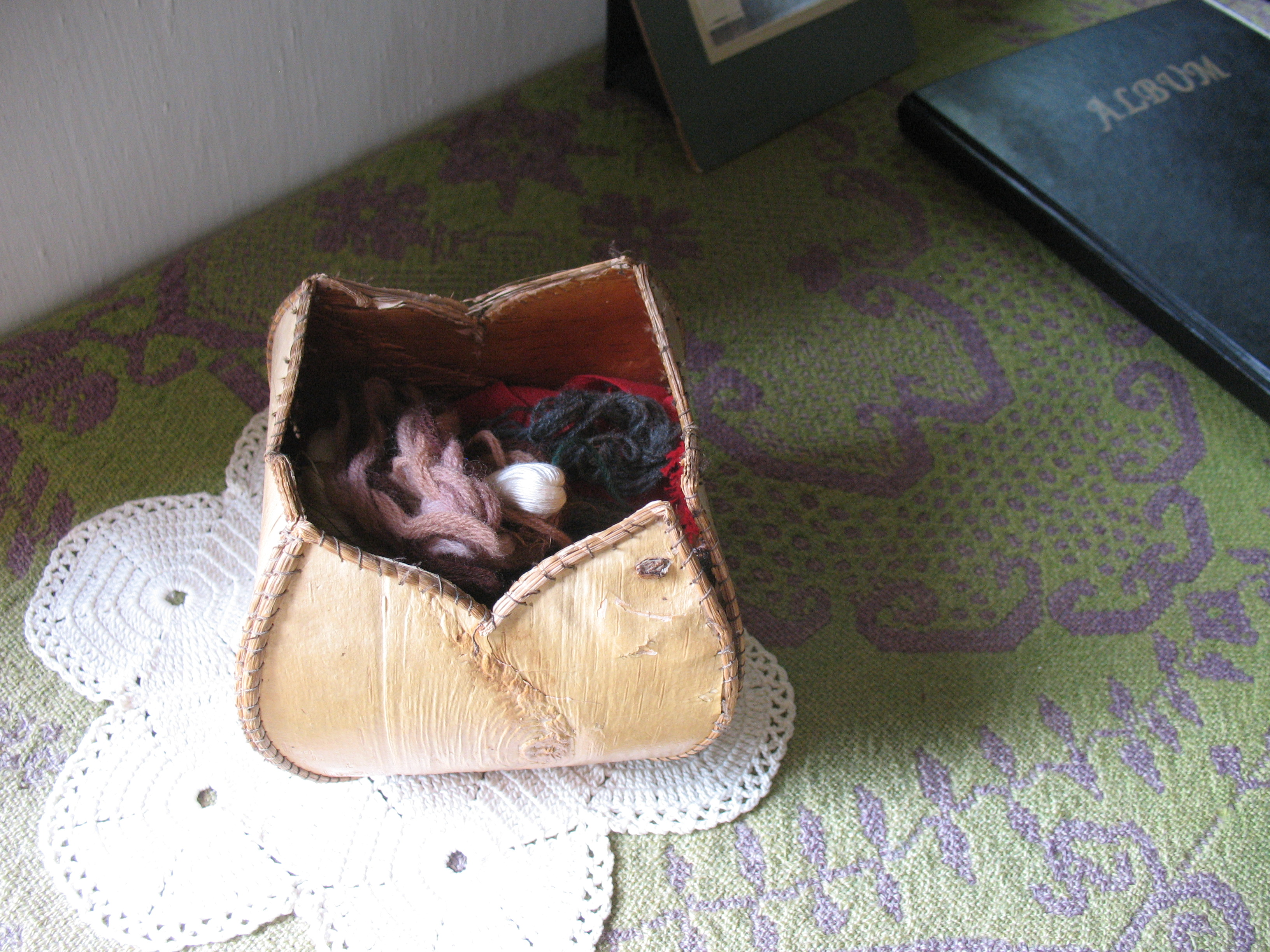 Zusammenlegbares Täschchen, hier mit Wollfäden gefüllt